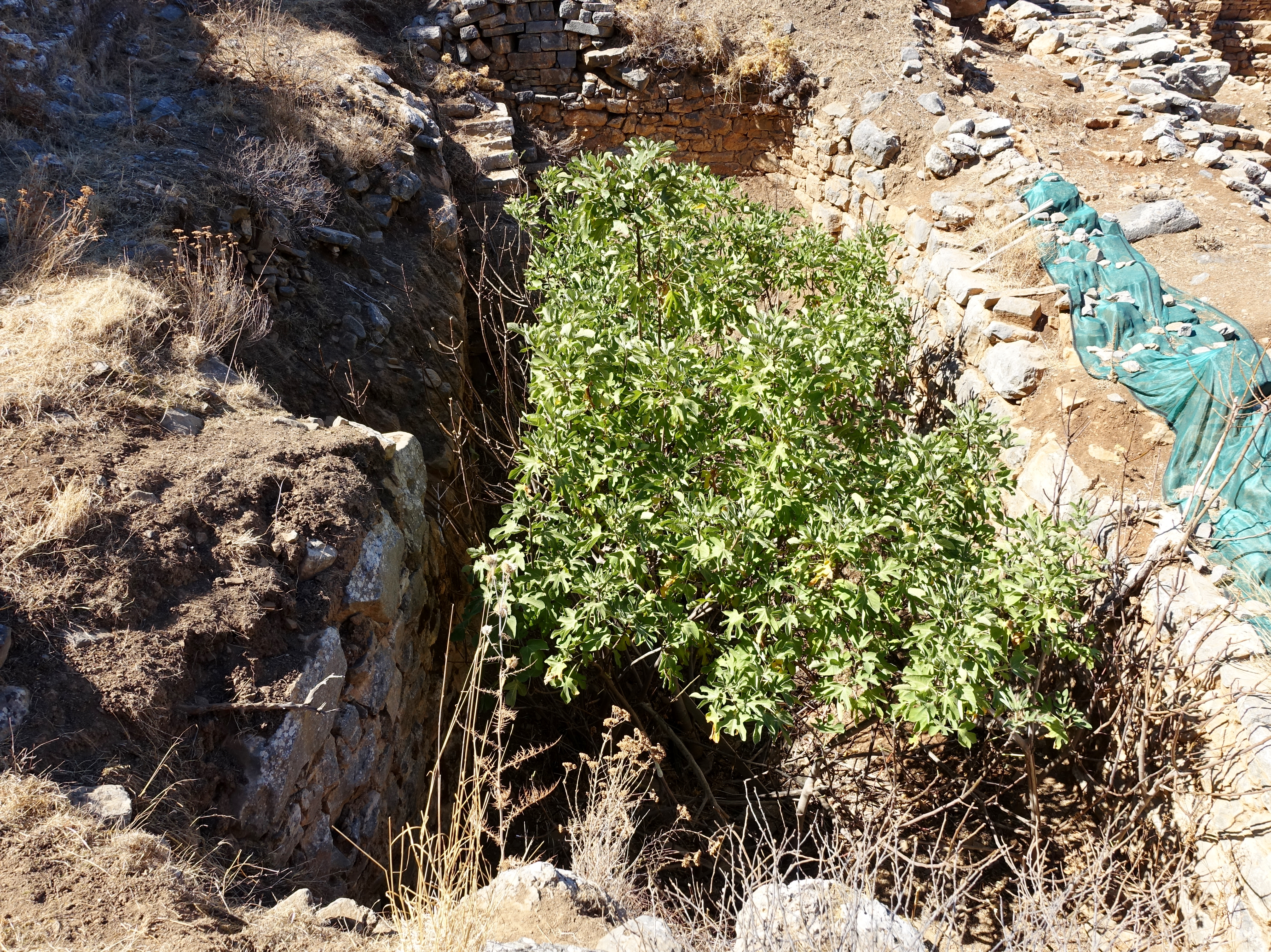 Ausgrabungsstätte von Dreros (Δρῆρος), Gemeinde Agios Nikolaos, Kreta, Griechenland